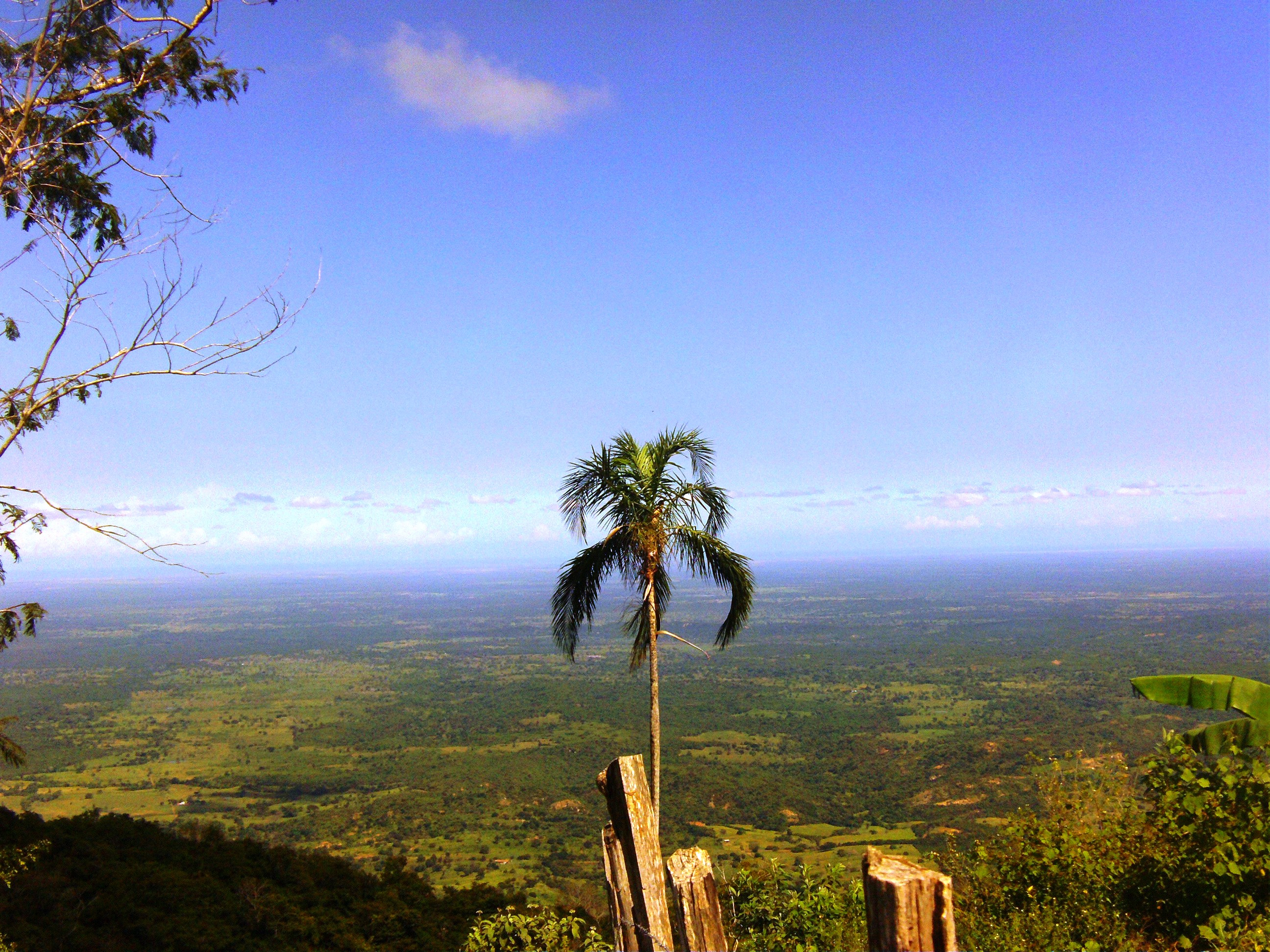 cerron